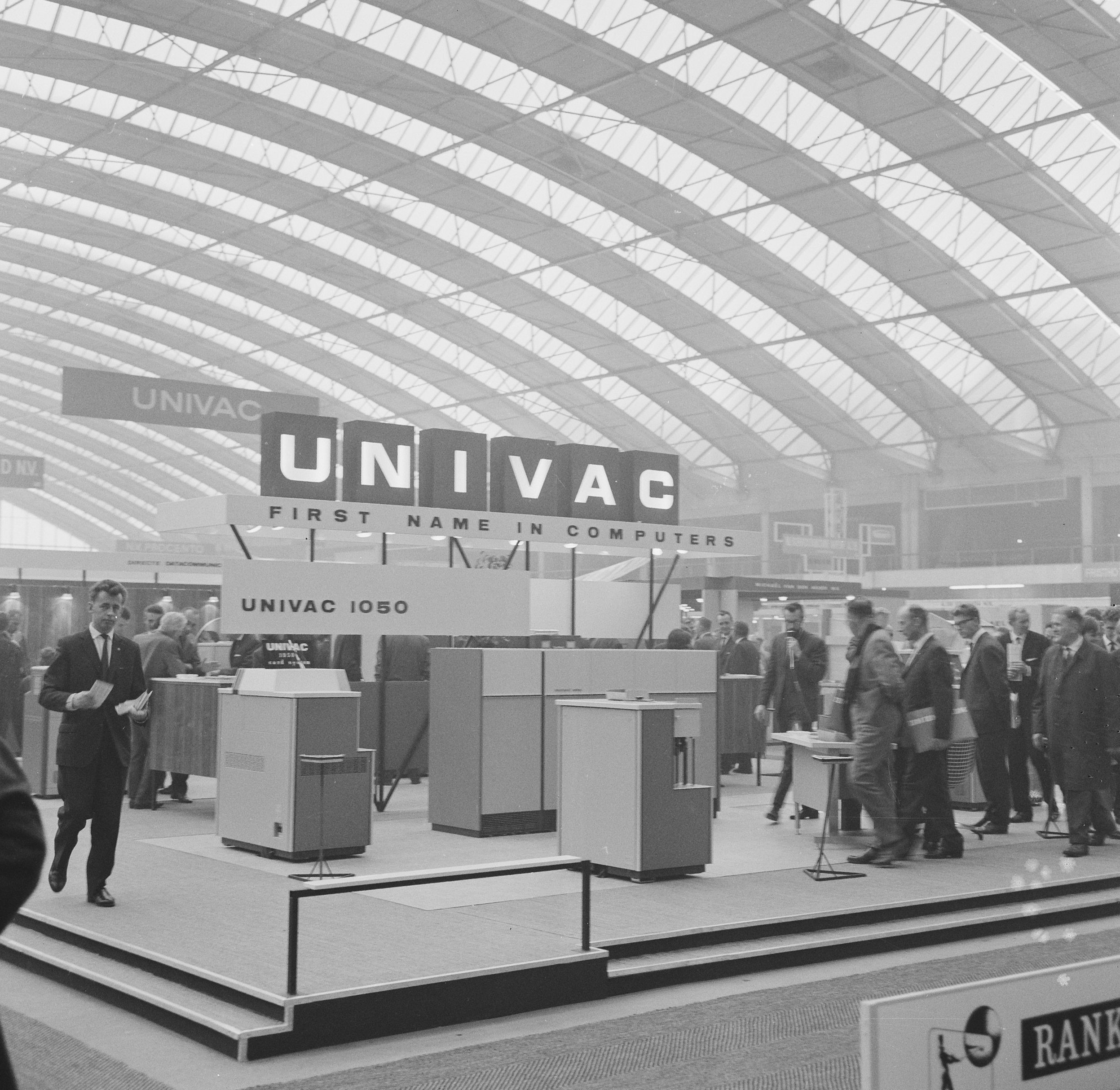 Collectie / Archief : Fotocollectie Anefo Reportage / Serie : [ onbekend ] Beschrijving : Opdracht Univac Datum : 26 oktober 1964 Persoonsnaam : Univac Fotograaf : Nijs, Jac. de / Anefo Auteursrechthebbende : Nationaal Archief Materiaalsoort : Negatief (zwart/wit) Nummer archiefinventaris : bekijk toegang 2.24.01.03 Bestanddeelnummer : 917-0542